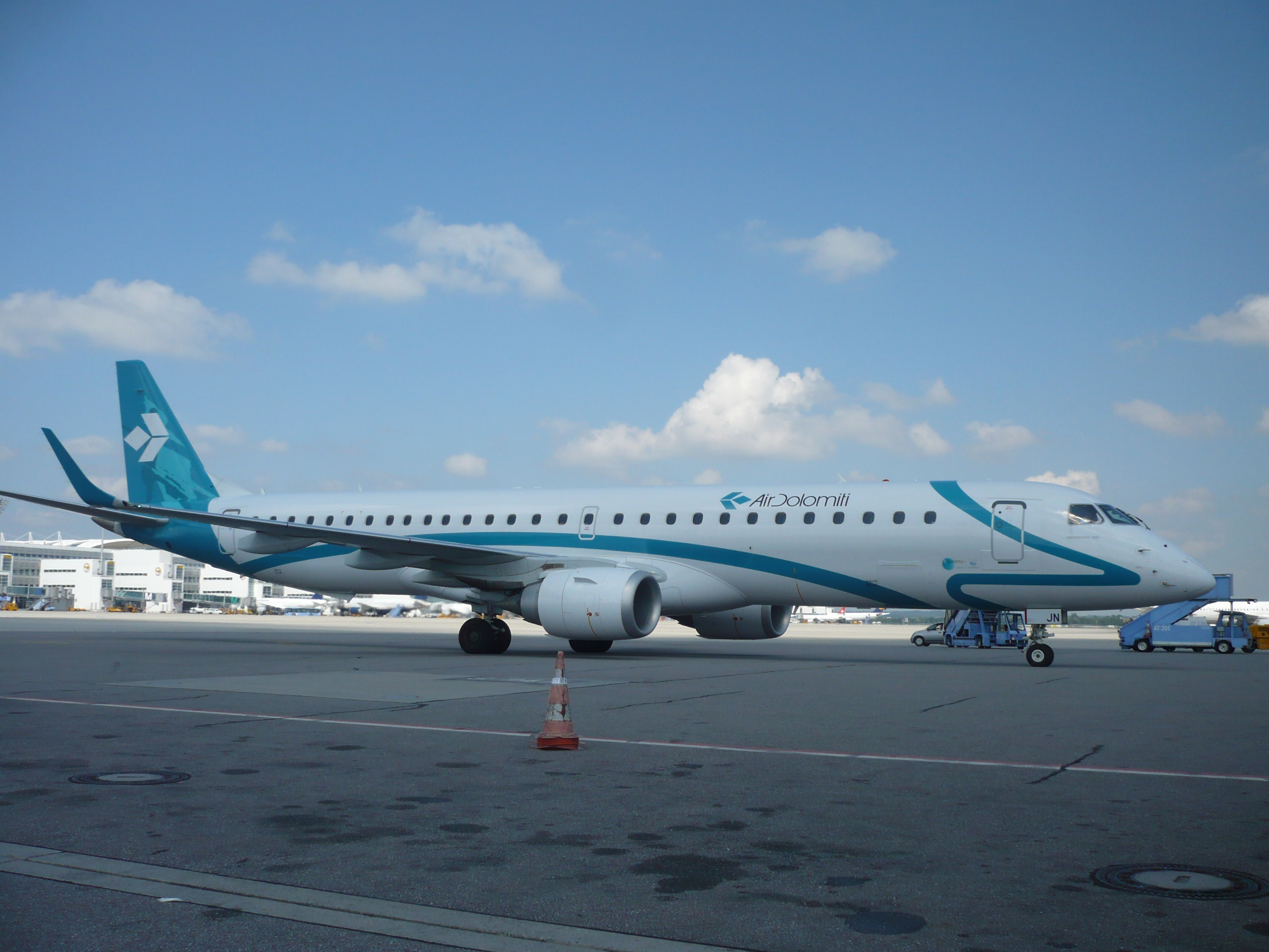 Embraer 195 der Air Dolomiti auf dem Vorfeld 2 des Flughafen München Franz Josef Strauß